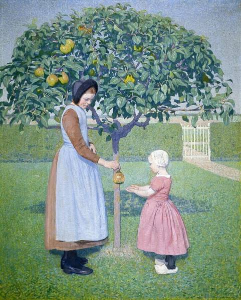 Twee kinderen onder een appelboom